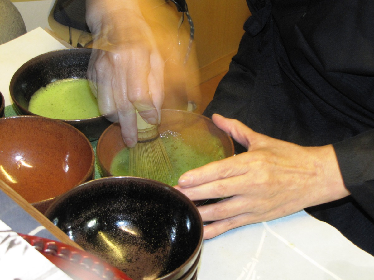 הכנת תה יפני ירוק